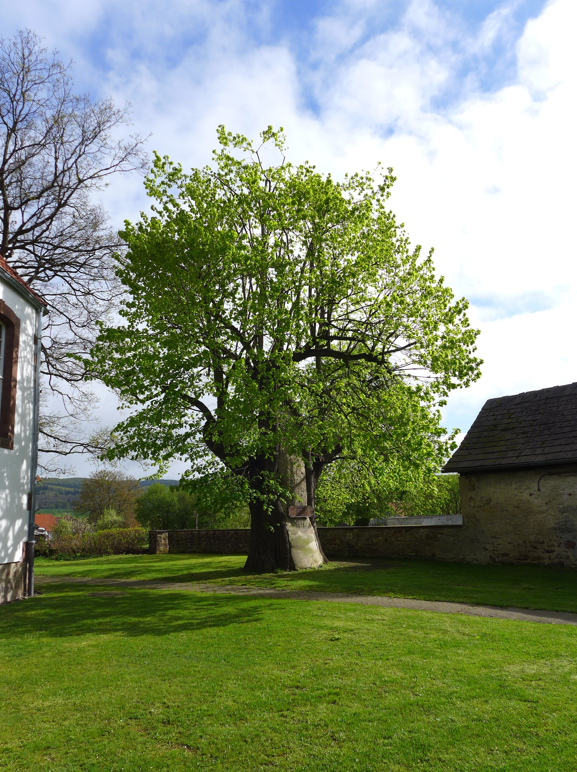 Die alte Linde neben der Magnuskirche im April 2014